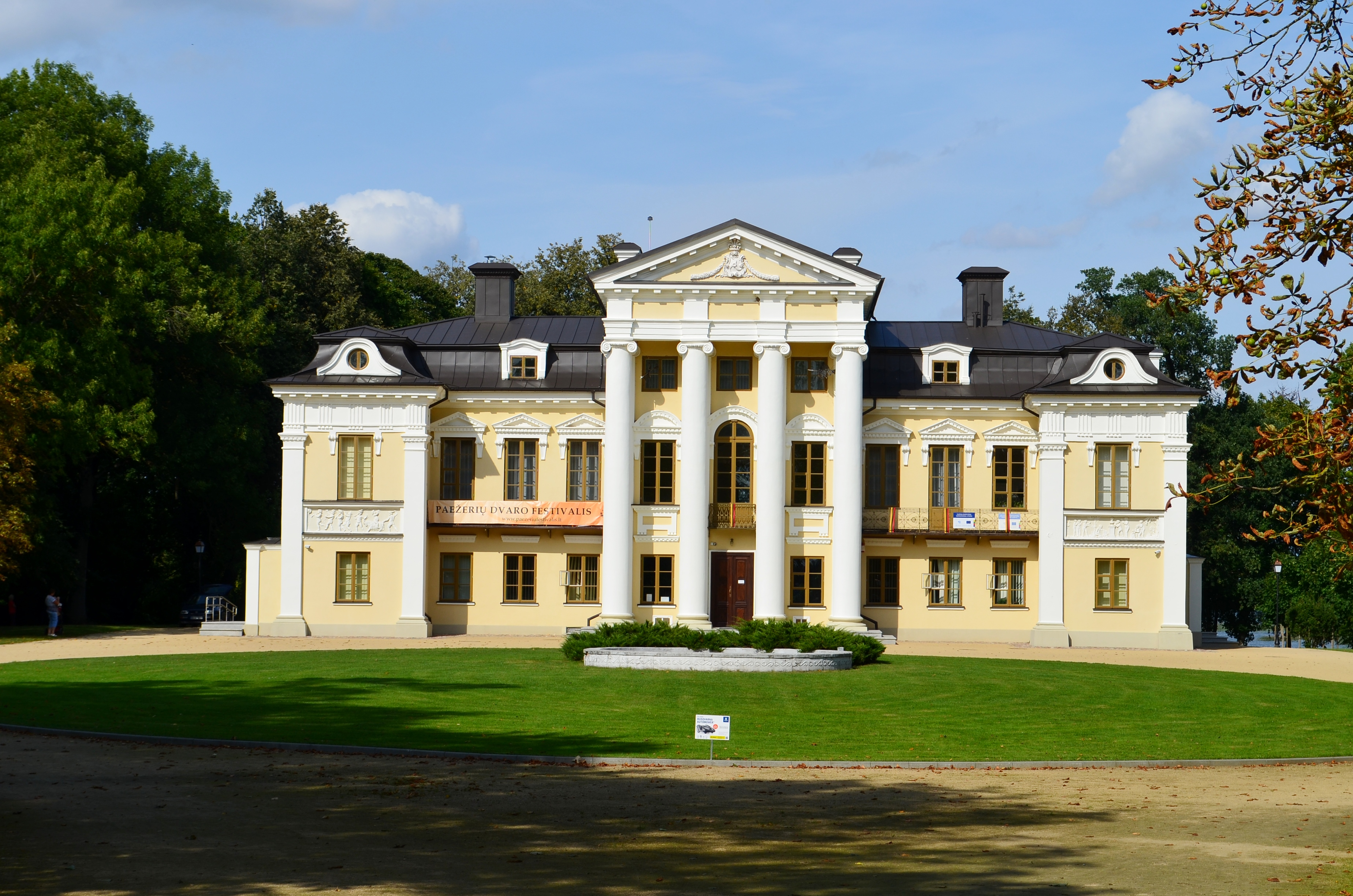 Paežerių dvaro rūmai, Vilkaviškio raj.